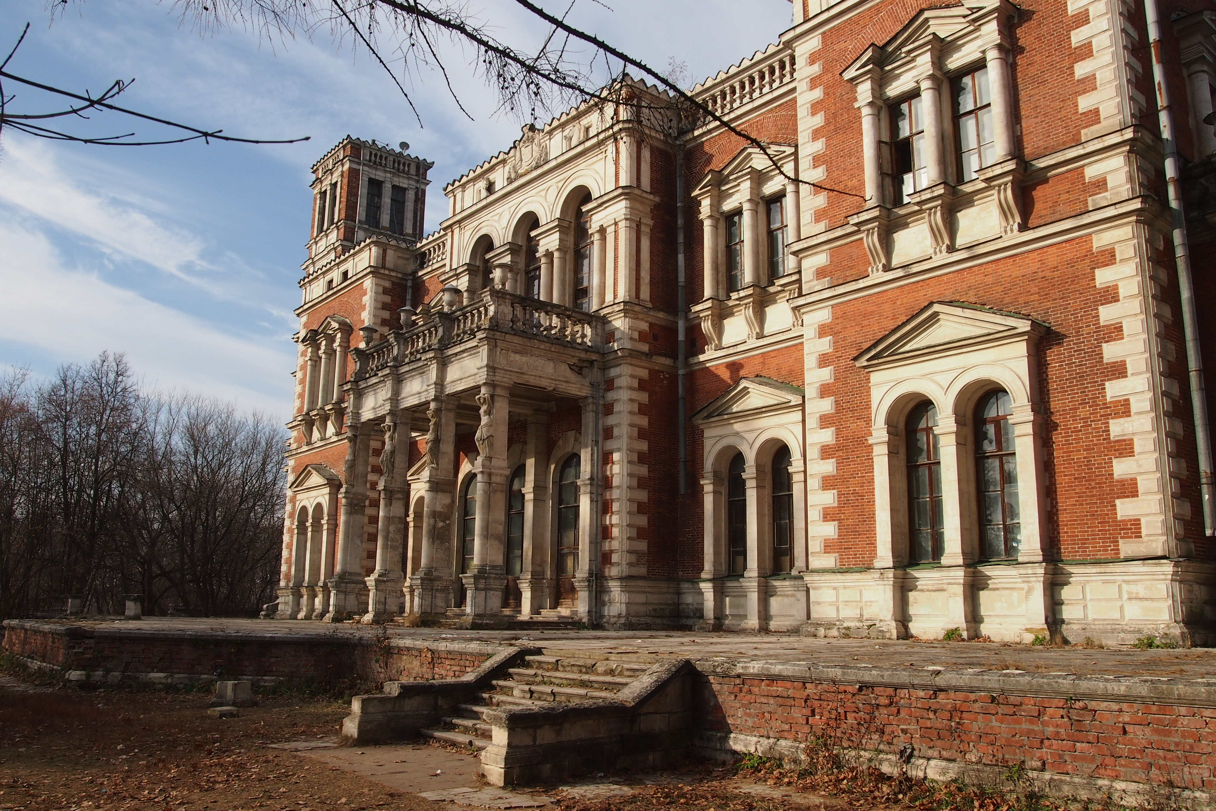 Главный дом (Москва и Московская область, Жуковский, село Быково)